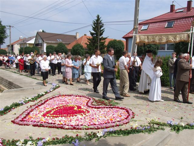 Kindergarten Hartian